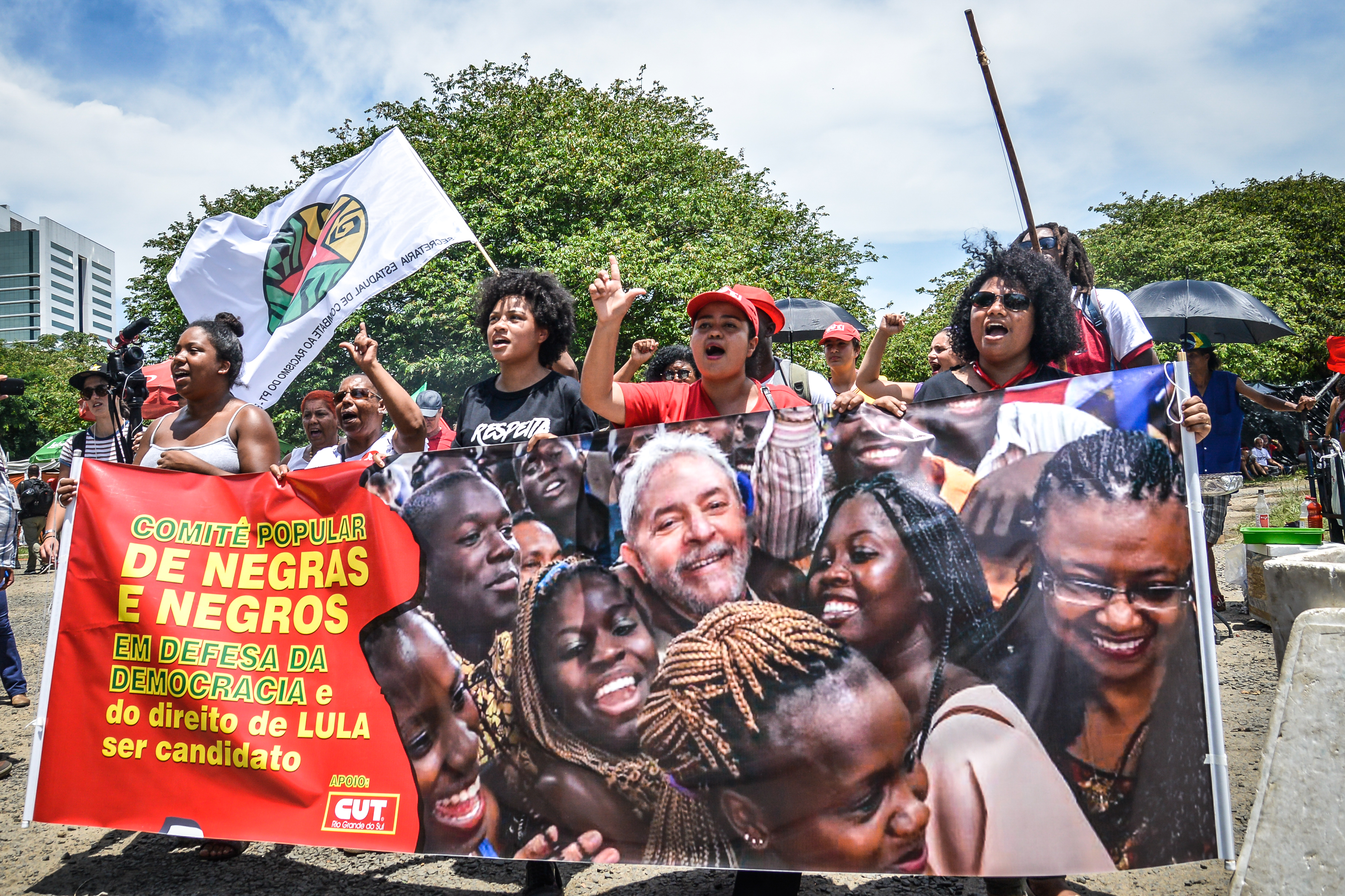 24012018-acampamento-85